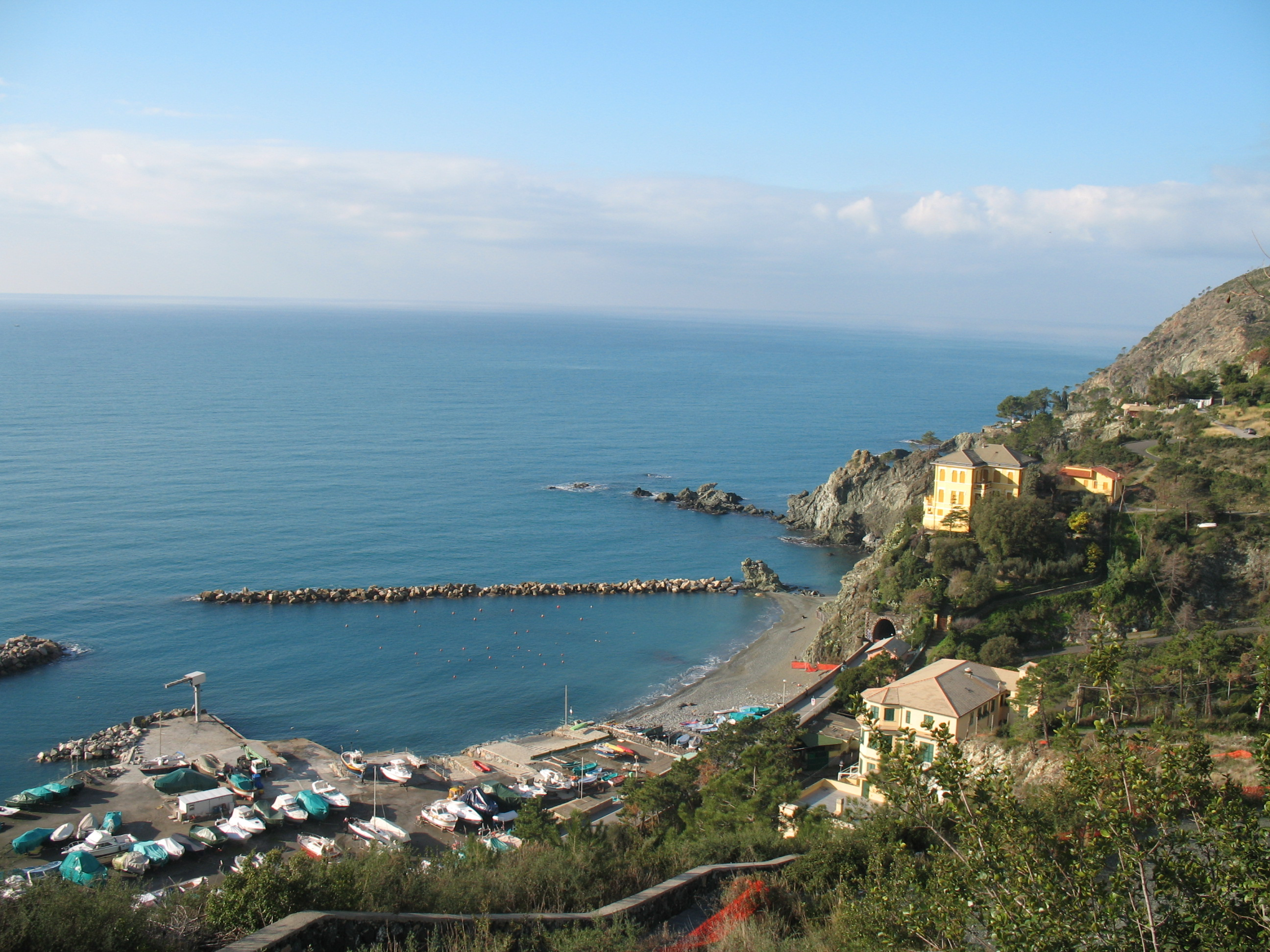 Immagine dalla Riviera ligure